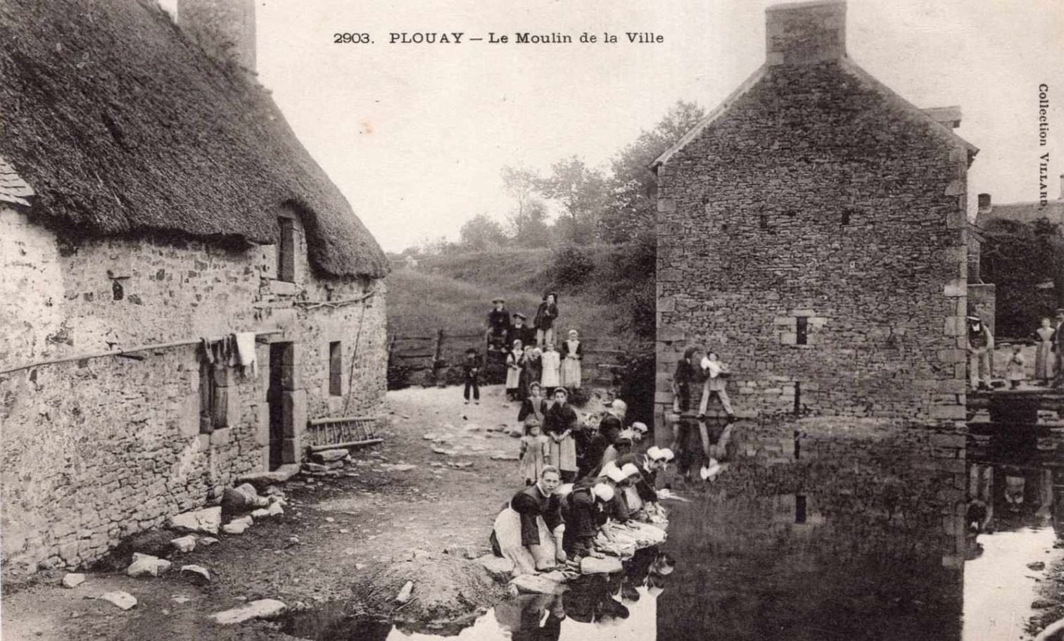 carte postale ancienne ( éditions Villard)